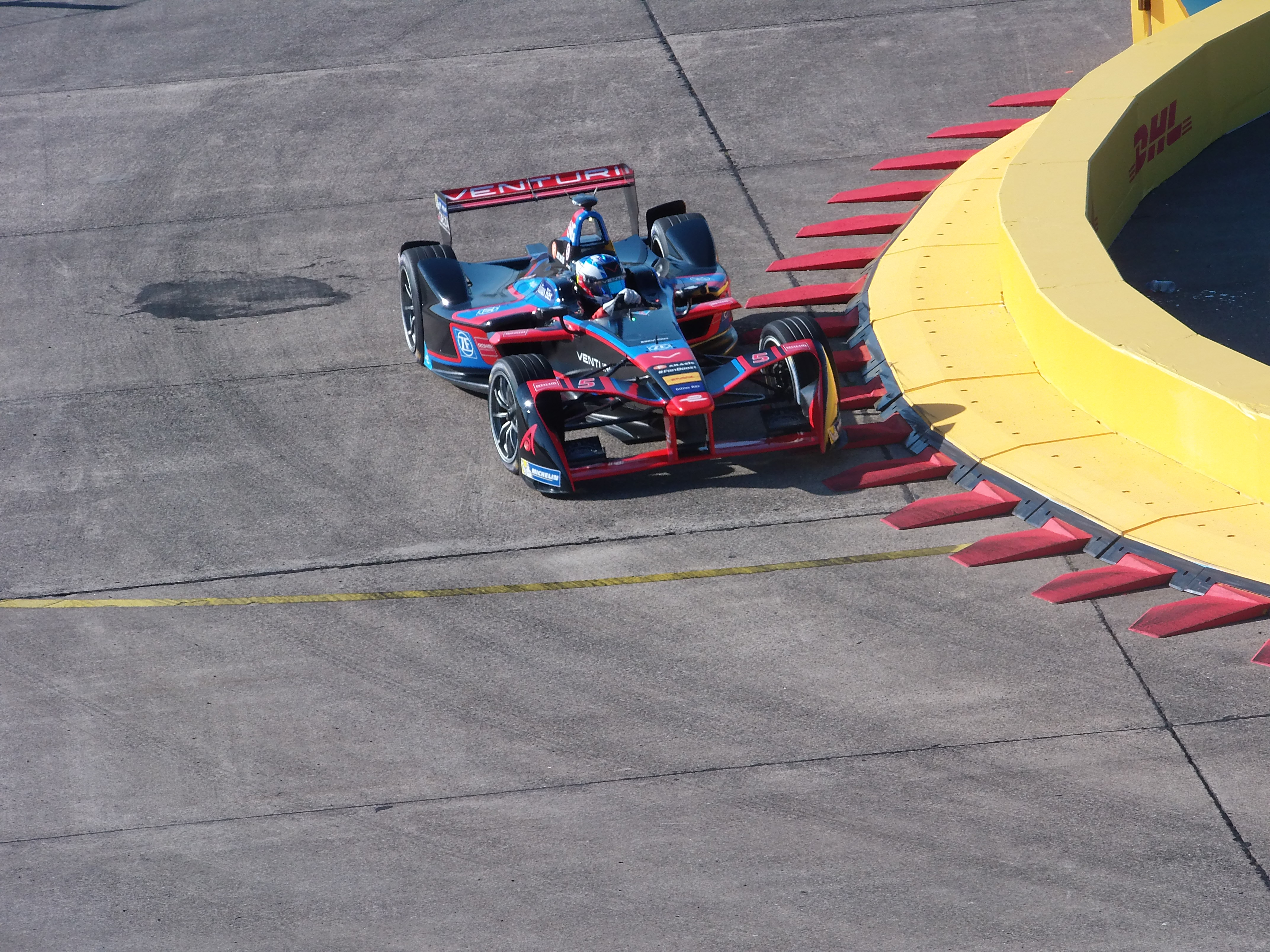 Maro Engel (Venturi) beim Berlin ePrix 2017